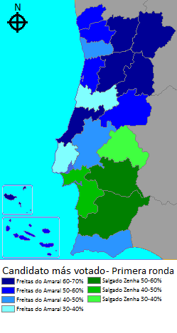 Resultados das eleições presidenciais portuguesas de 1986 - primeira volta